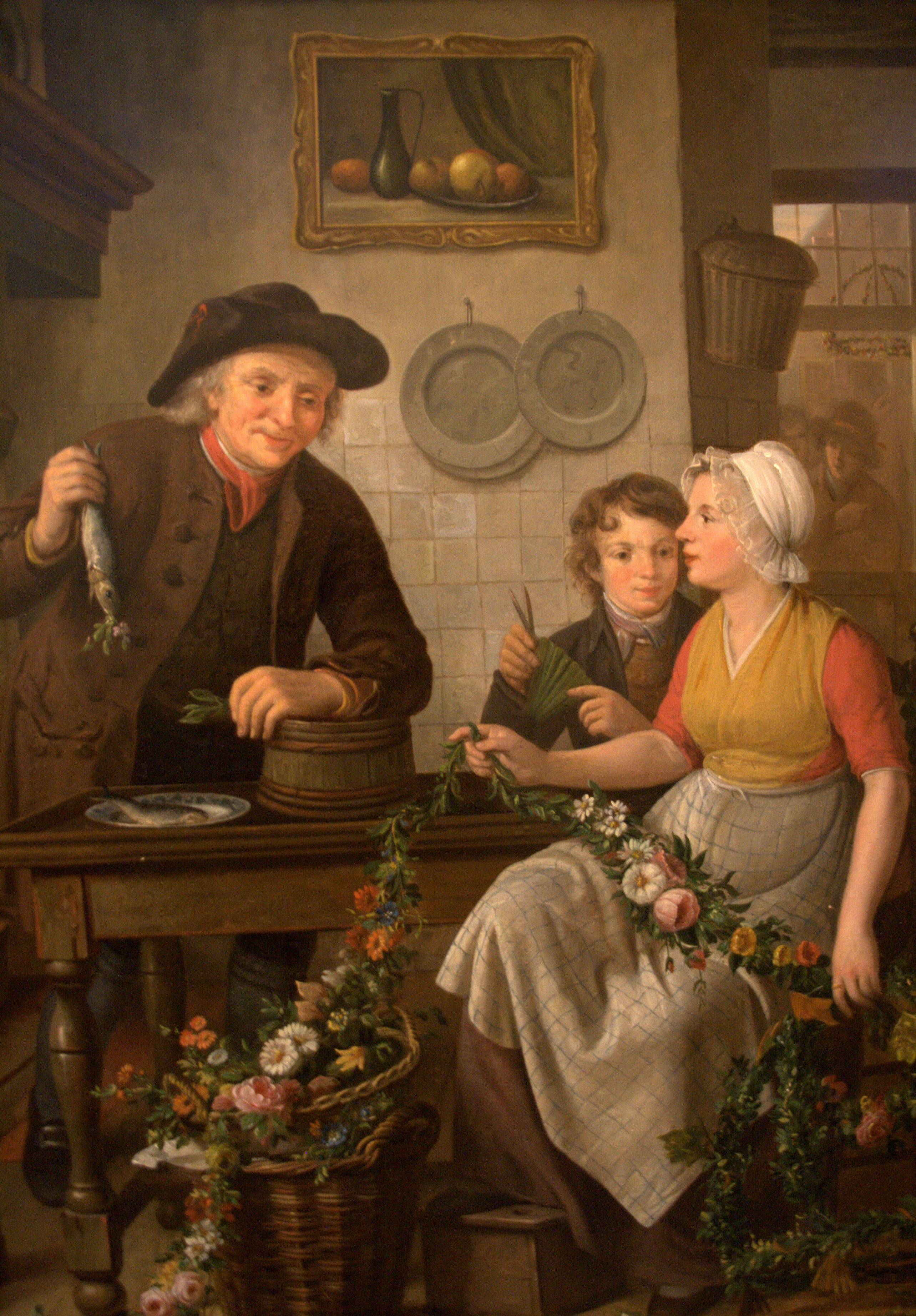 Voorbereidingen voor de verkoop van de nieuwe haring